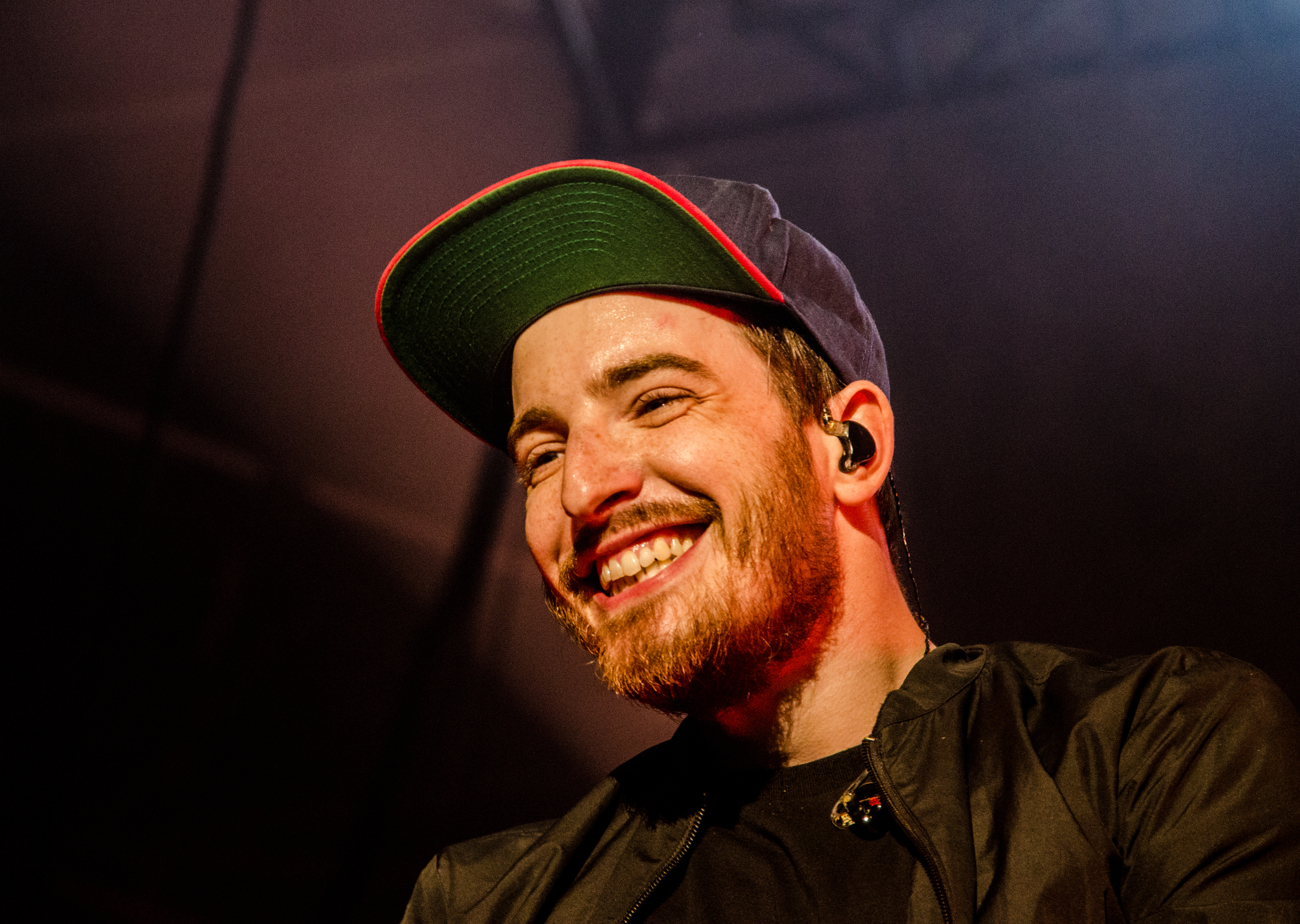 Casper auf dem Kosmonaut Festival 2014 in Chemnitz Oberrabenstein. Headliner des Festivals am Freitag.